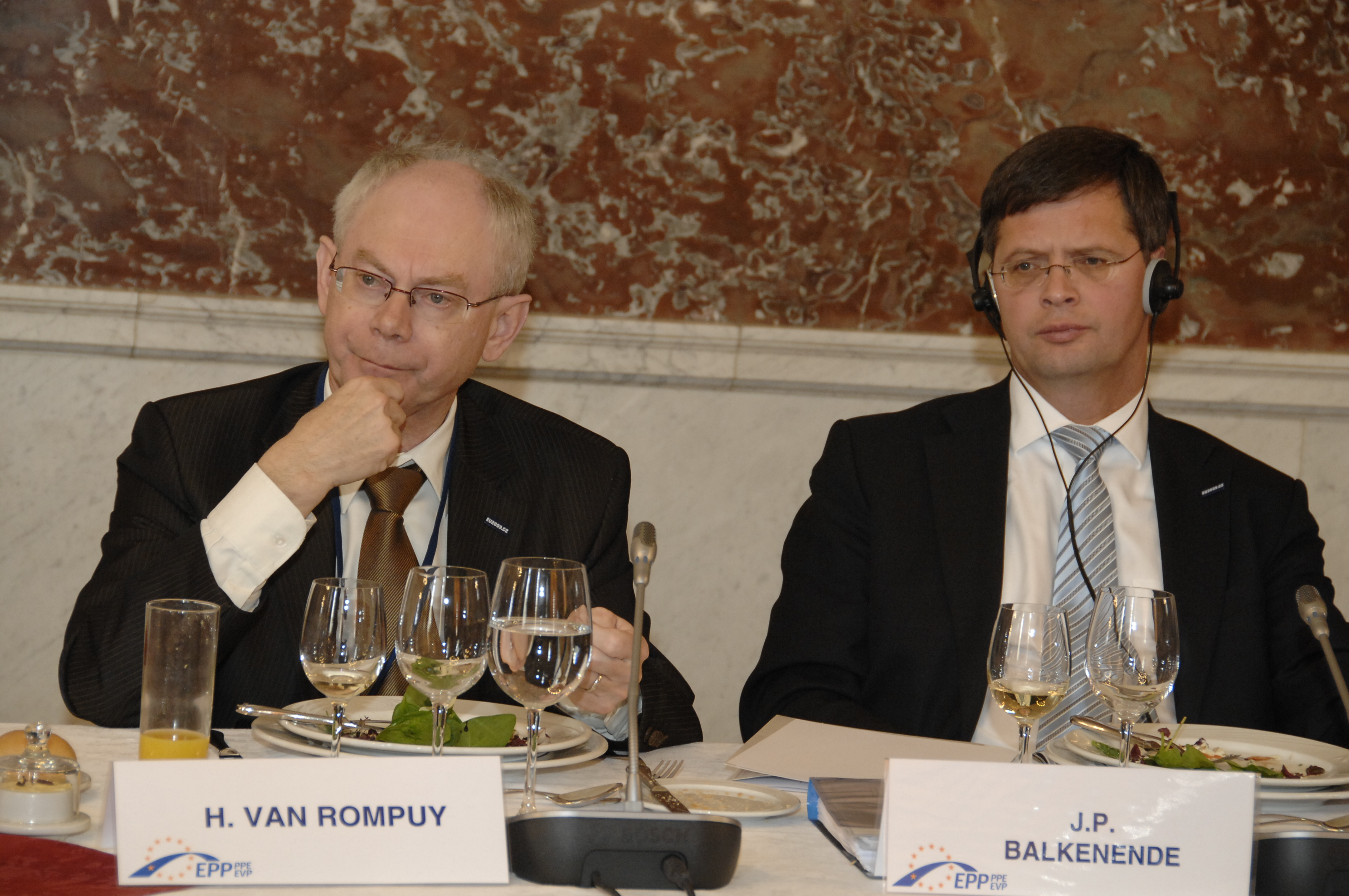 EPP Summit 19 March 2009